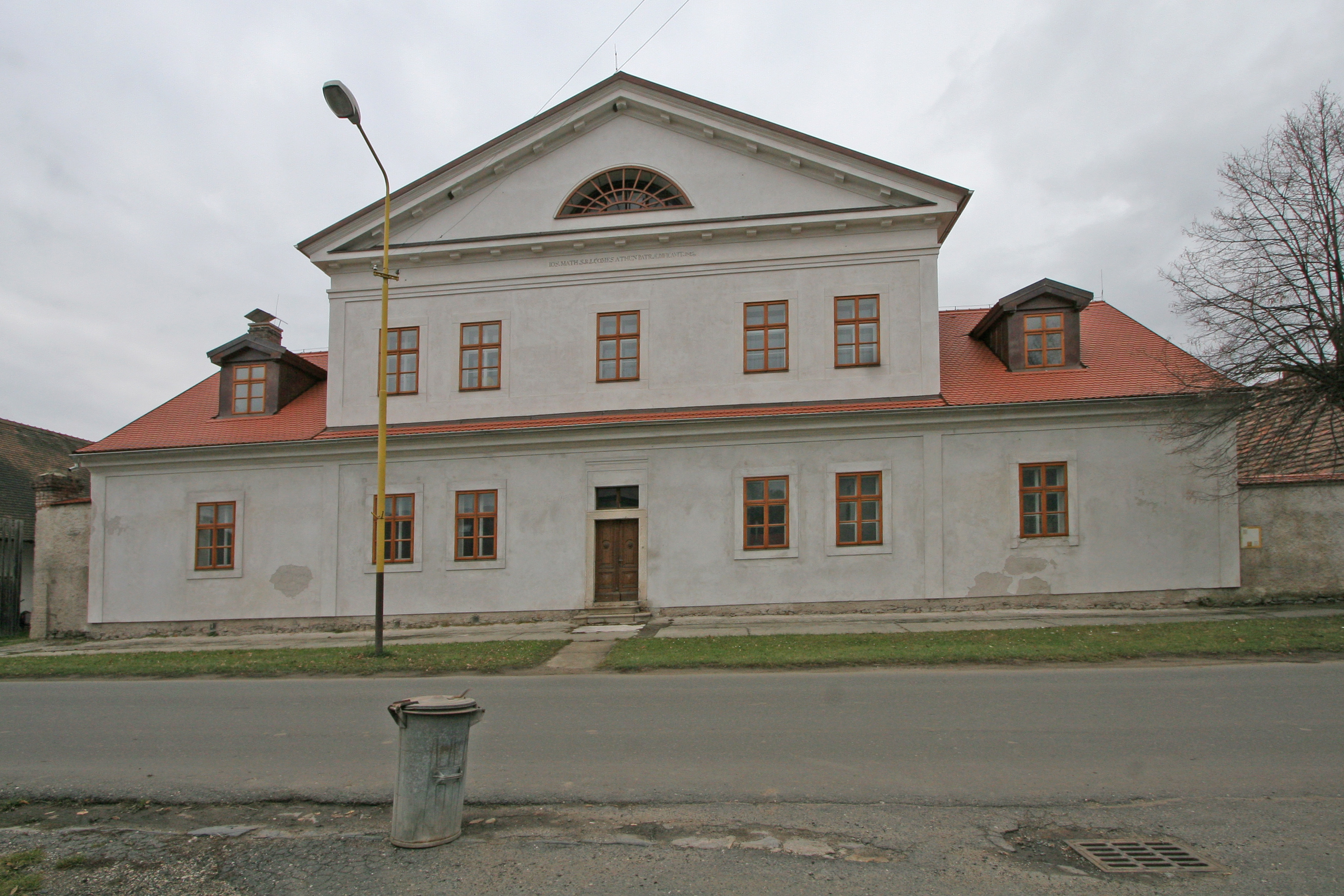 Děkanství (Chotusice), Chotusice 1